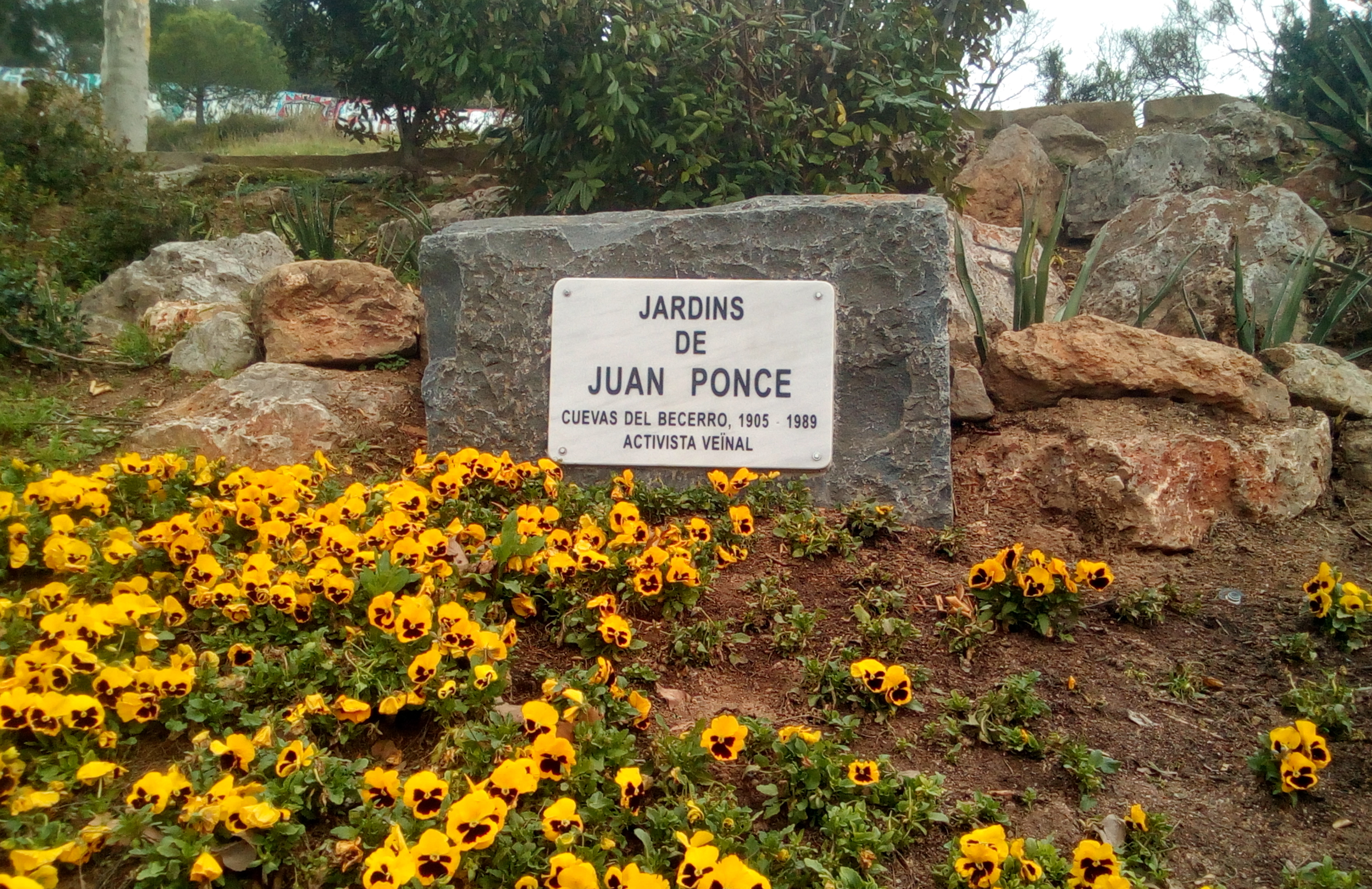 Jardines de Juan Ponce